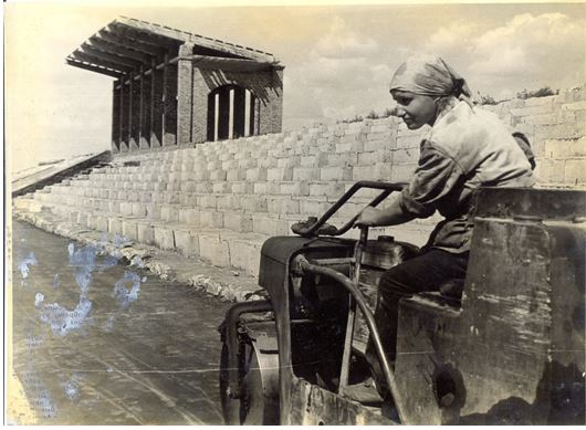 Строительства стадиона город Отрадный